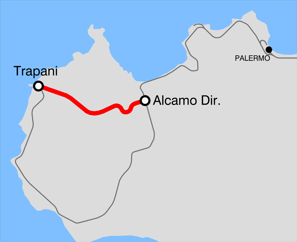 Mappa della ferrovia Alcamo Diramazione-Trapani